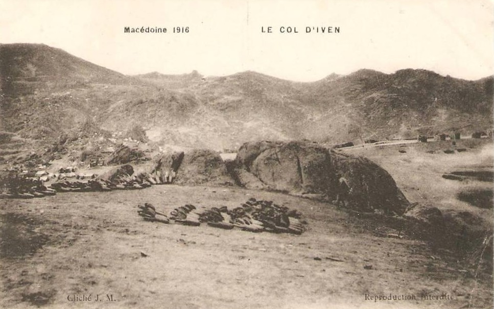 Съглашенски позиции при Ивени през Първата световна война